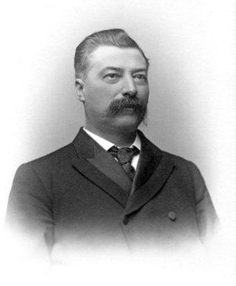 Louis-Jules Allard (1859-1945)